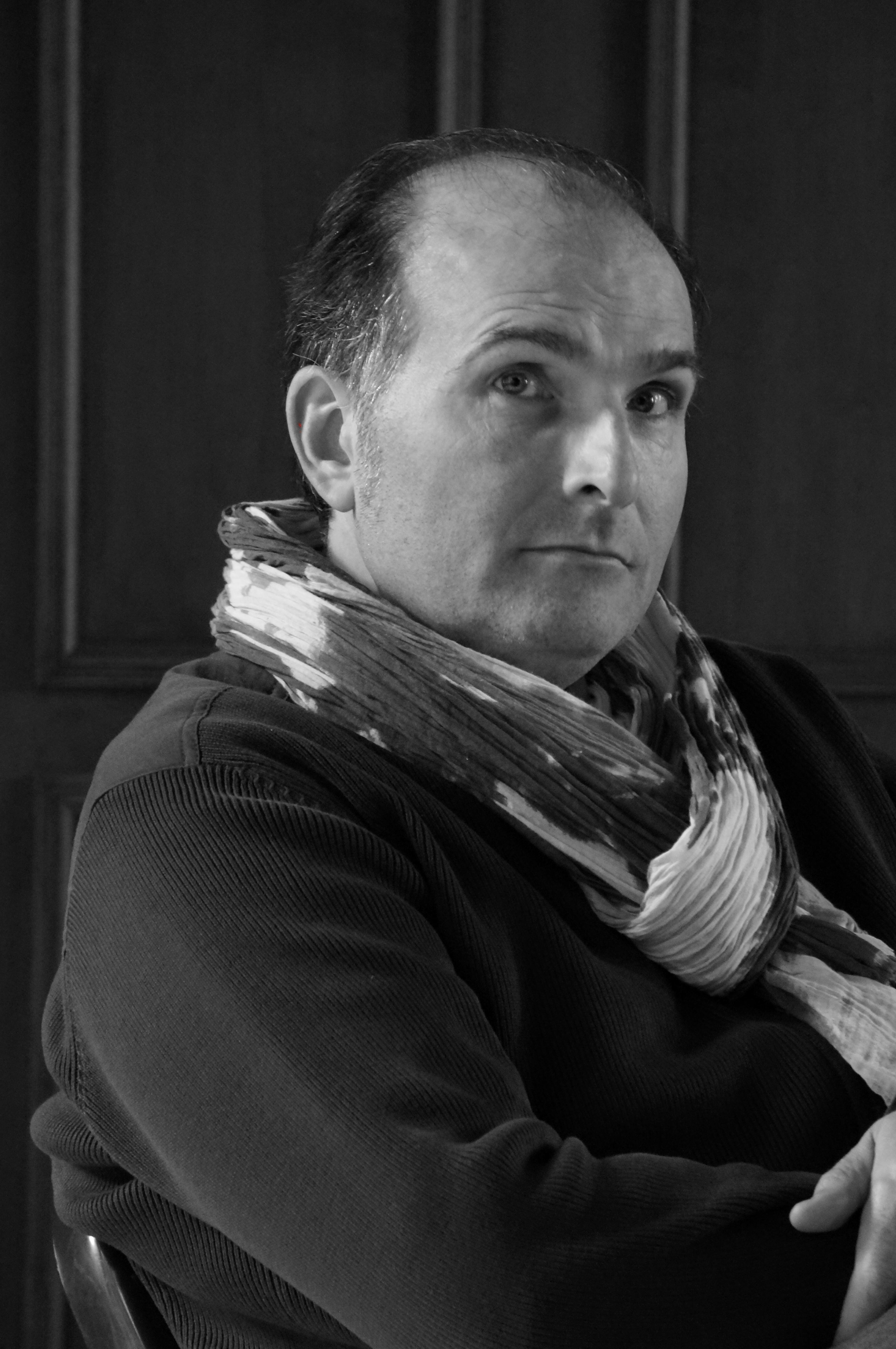 lors du 8e festival Interpol'art .